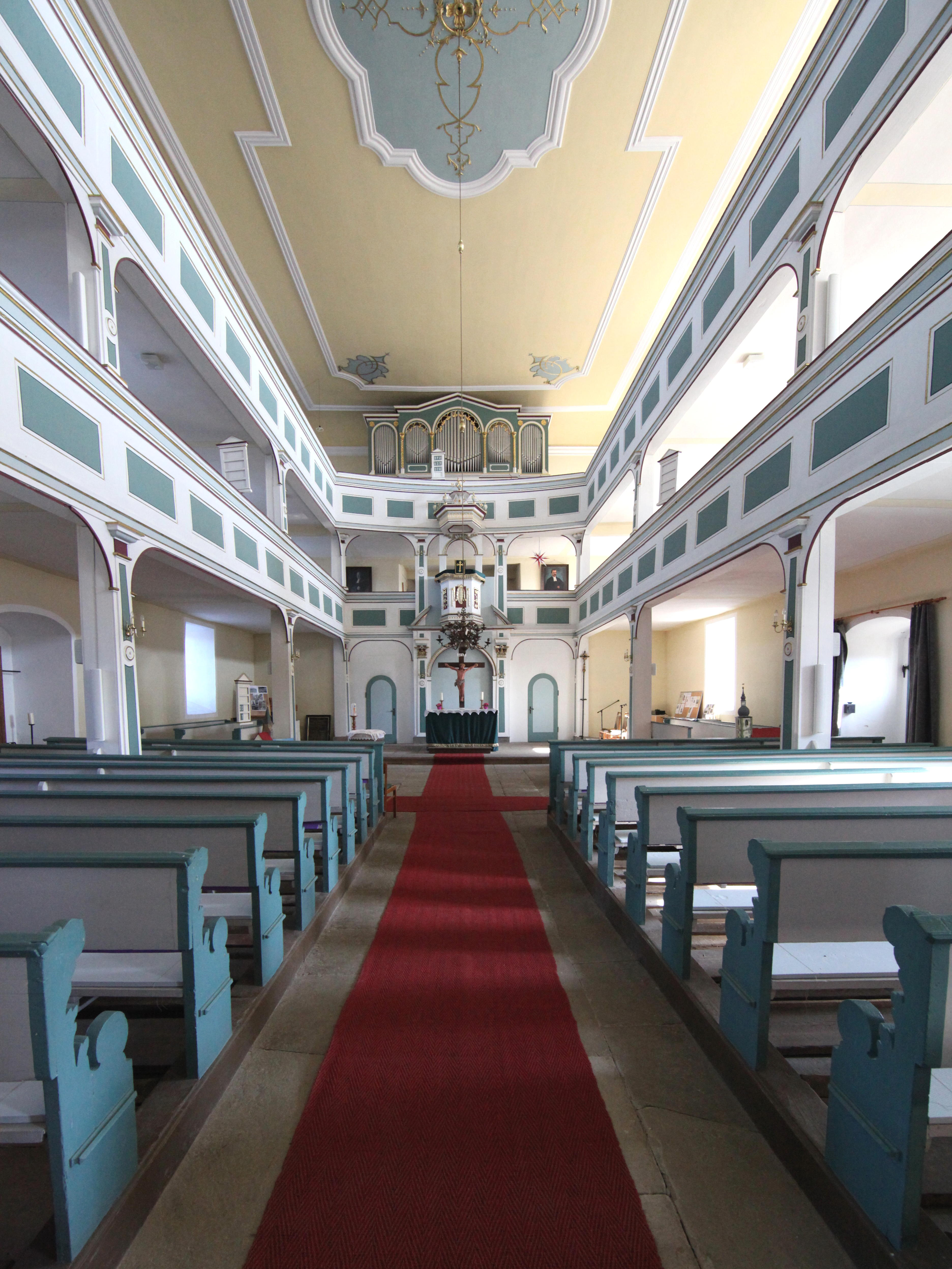 St. Marien in Eishausen, Landkreis Hildburghausen